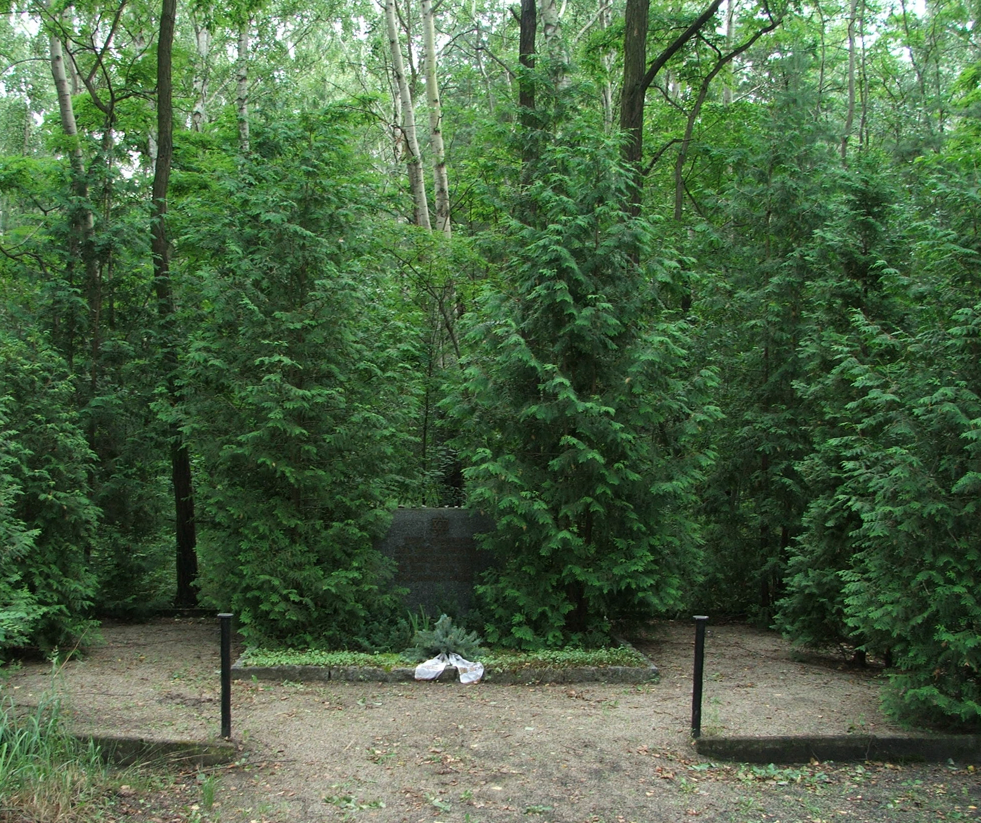 Grabstein am Kilometer 106,7 Der Verlorene Zug